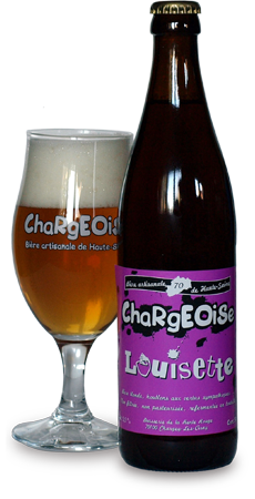 Verre et bouteille de la bière Chargeoise Louisette, de la brasserie de la Rente Rouge, en France.